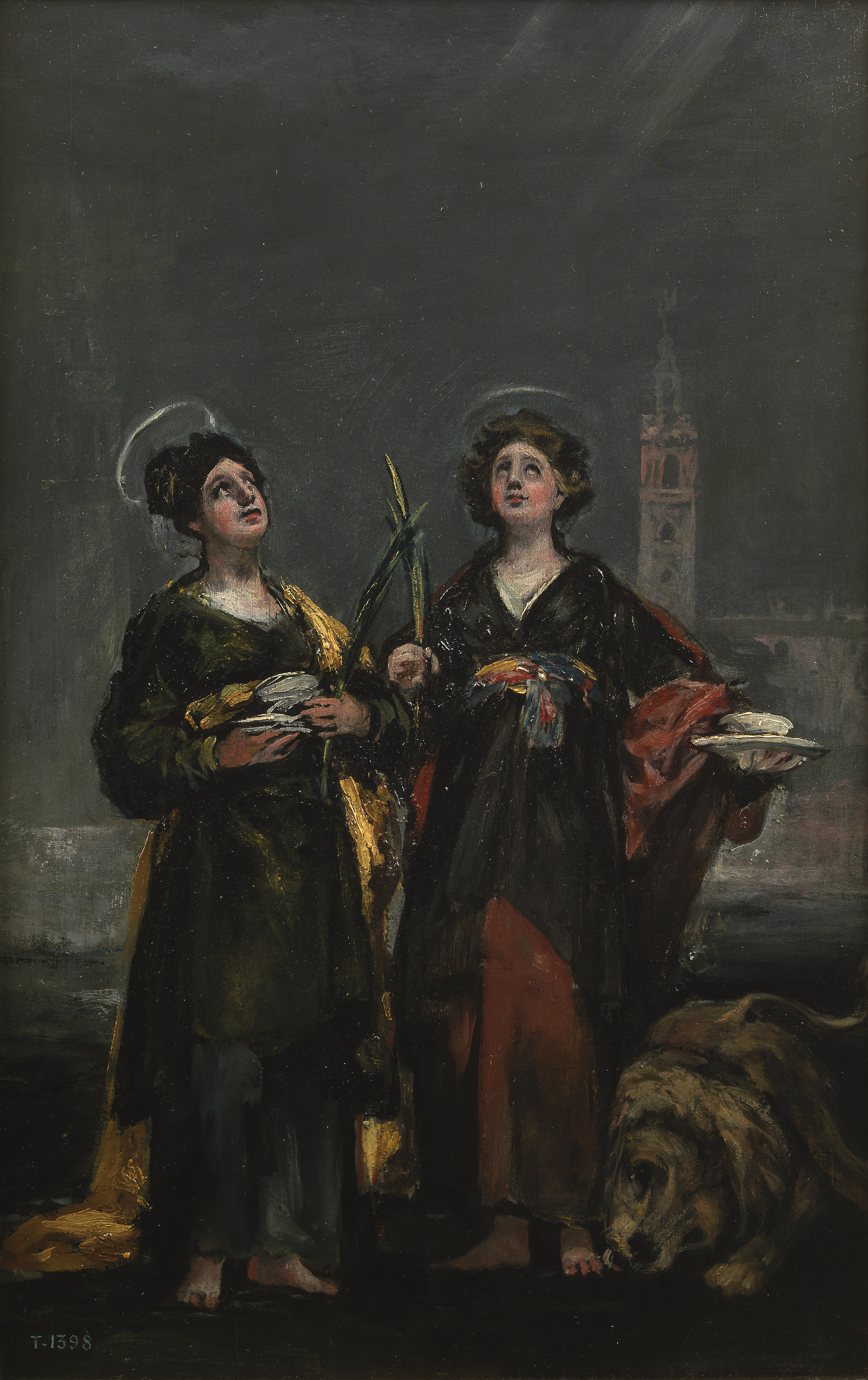 Este es uno de los varios bocetos que Francisco de Goya realize antes de pintar el cuadro de las Santas Justa y Rufina destinado al altar de la Sacristía de los Cálices de la catedral de Sevilla, (España), donde aún permanece. El cabildo catedralicio sevillano le encargó el mencionado cuadro a Goya en 1817, y por mediación de Agustín Ceán Bermúdez, que era un erudito y escritor de arte y amigo personal de Goya. Las santas alfareras, Justa y Rufina, que son las patronas de Sevilla, fueron martirizadas por haberse negado a adorar una imagen de la diosa Venus, y siempre suelen ser representadas junto a objetos de barro como símbolo de su profesión y con las palmas del martirio. En esta obra un león lame mansamente el pie de Santa Rufina, herido por haberla forzado a caminar desde la sierra hasta Sevilla, y esta ciudad aparece al fondo, destacándose la Torre de la Giralda de la catedral sevillana, que según la tradición quedó en pie por la intervención milagrosa de las santas durante el terremoto que asoló Sevilla en 1504.